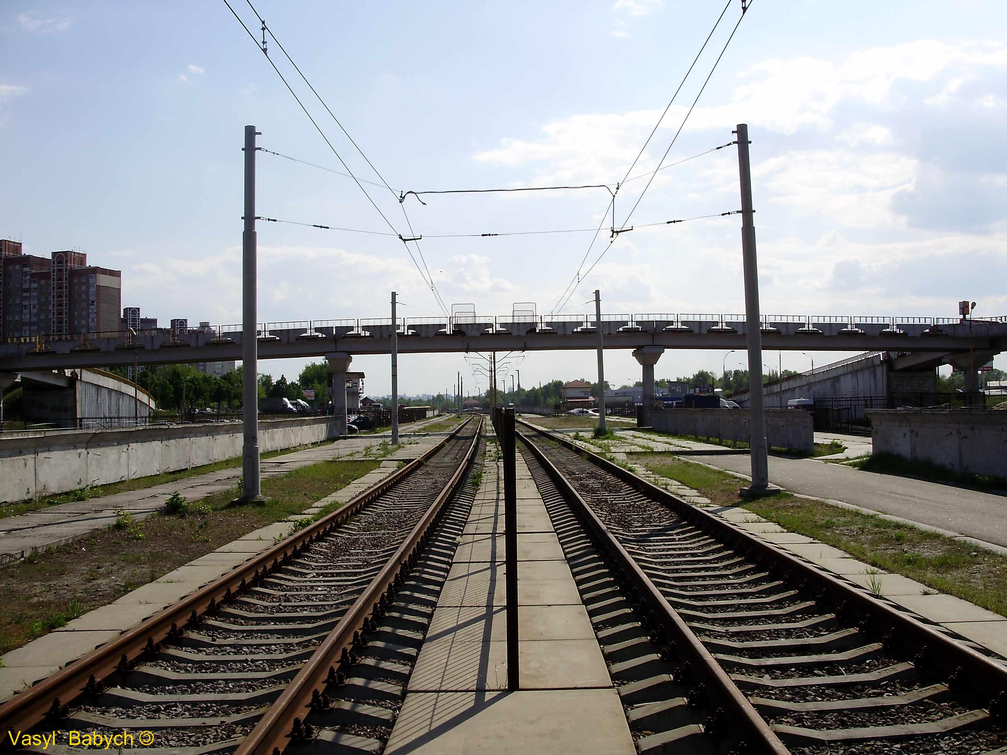 Ст. Каштанова Лівобережної лінії Київського Швидкісного трамваю